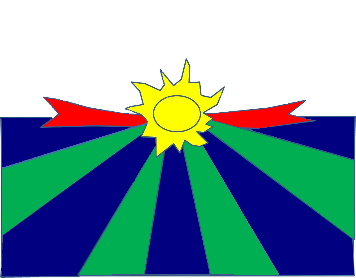 Bandera del municipio Esteller, estado Portuguesa, Venezuela